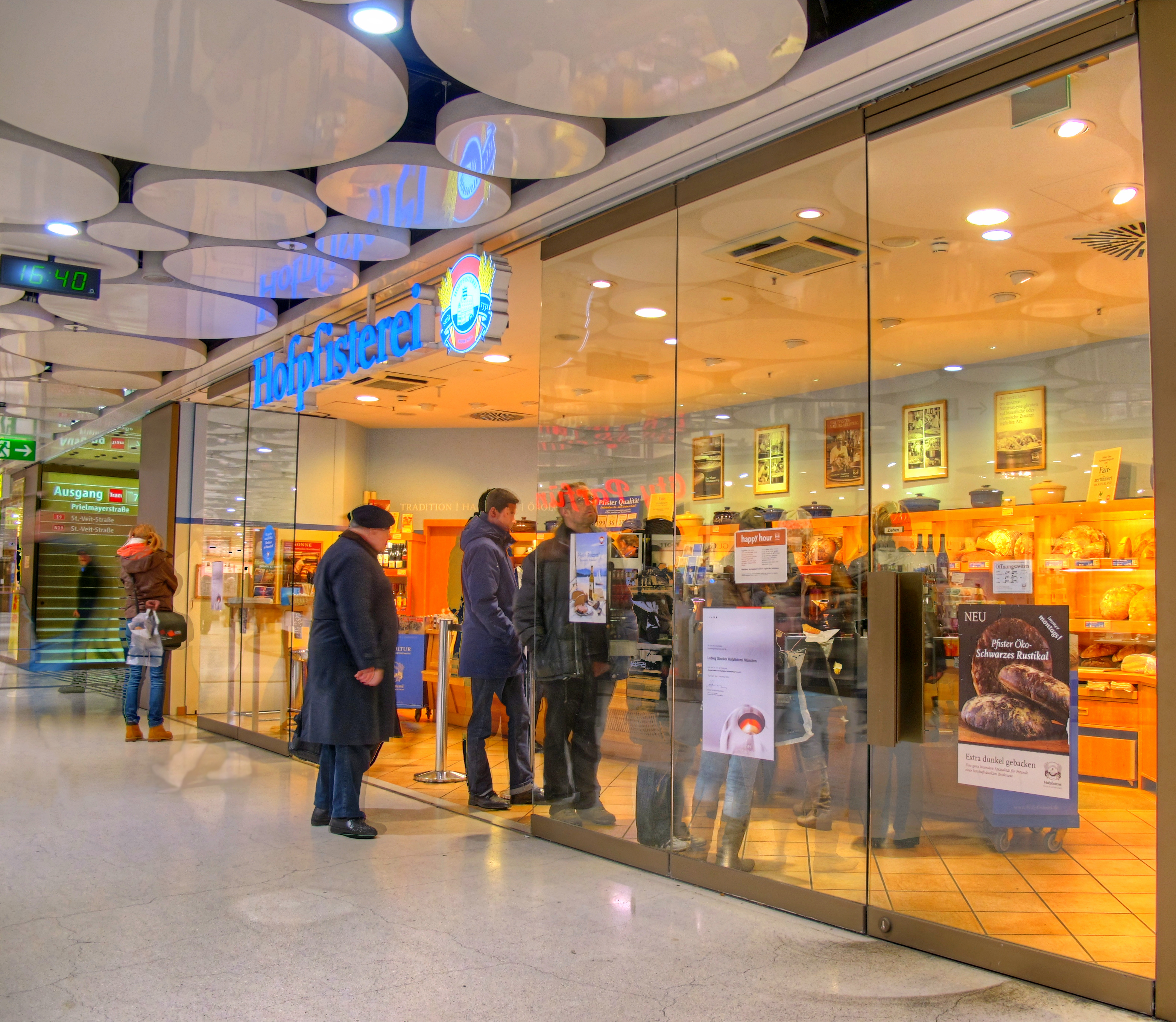 Deutschland, Bayern, Oberbayern, München, Stachus, Karlsplatz, Untergeschoß, Ebene -1, Filiale Bäckerei Hofpfister